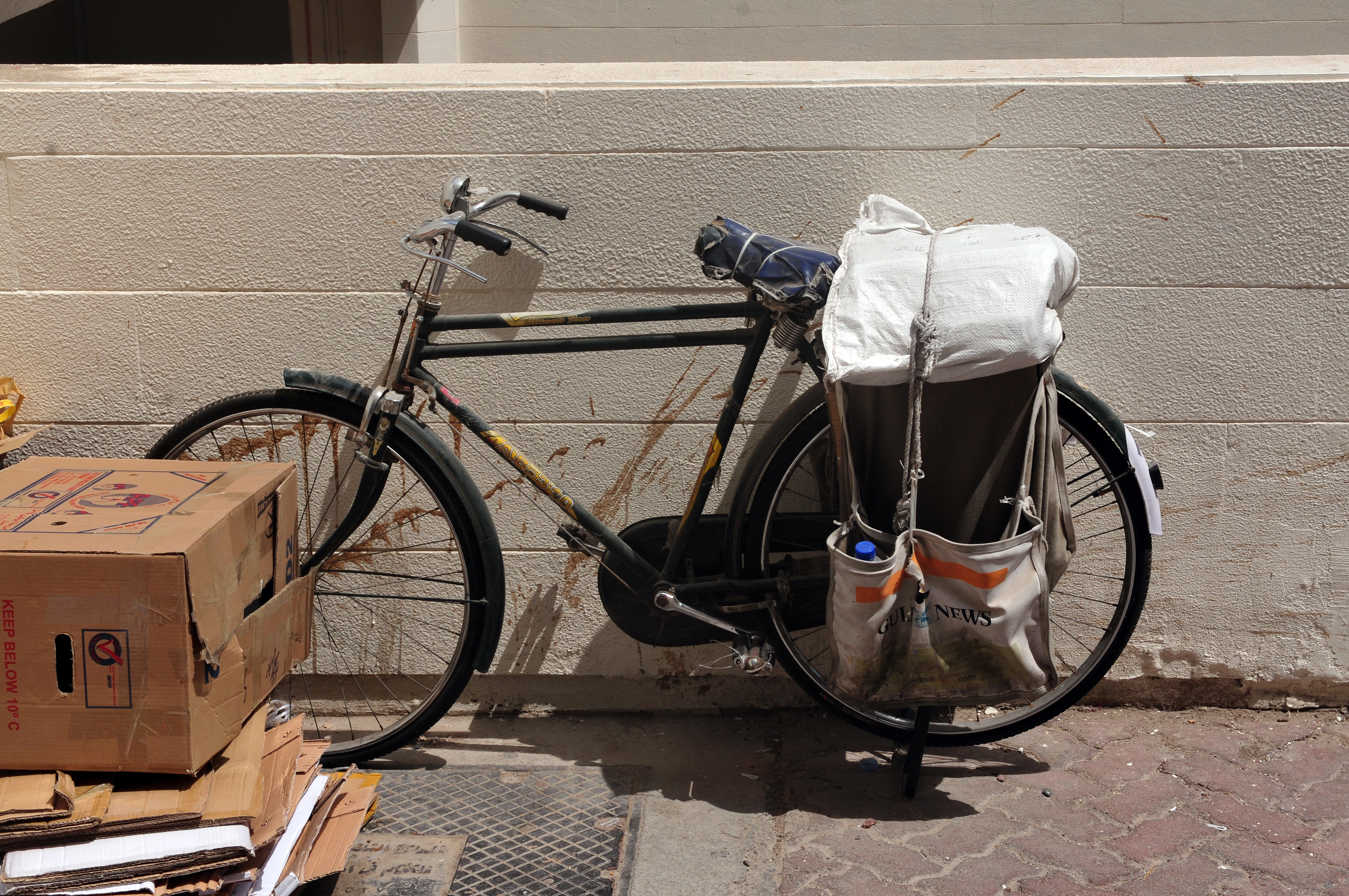 travel to Wikimania 2013: Abu Dhabi